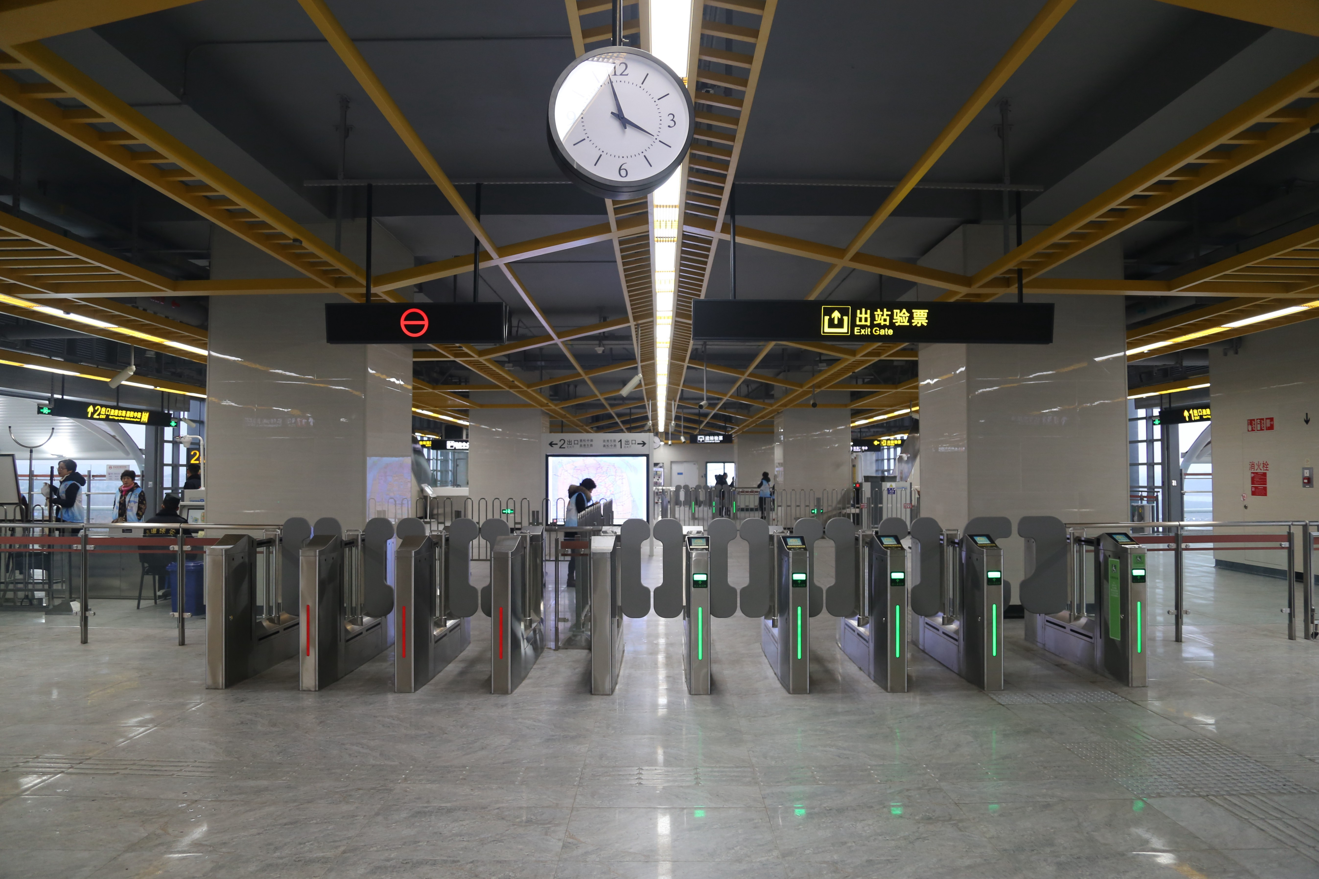 嘉松中路站站厅